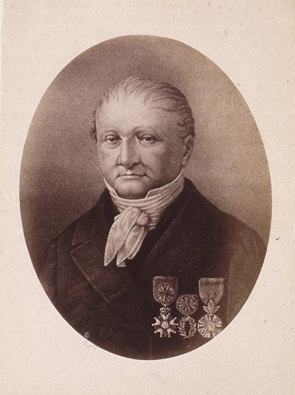 Charles-Henri Schattenmann. A. Meyer (phot.). 1890. Bibliothèque nationale et universitaire de Strasbourg